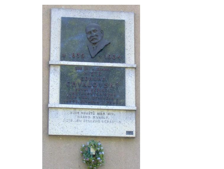 Pamětní deska Edmunda Chvalovského(1839-1934) v Soběslavi, čp.345 autor desky Rudolf Kabeš-Tábor